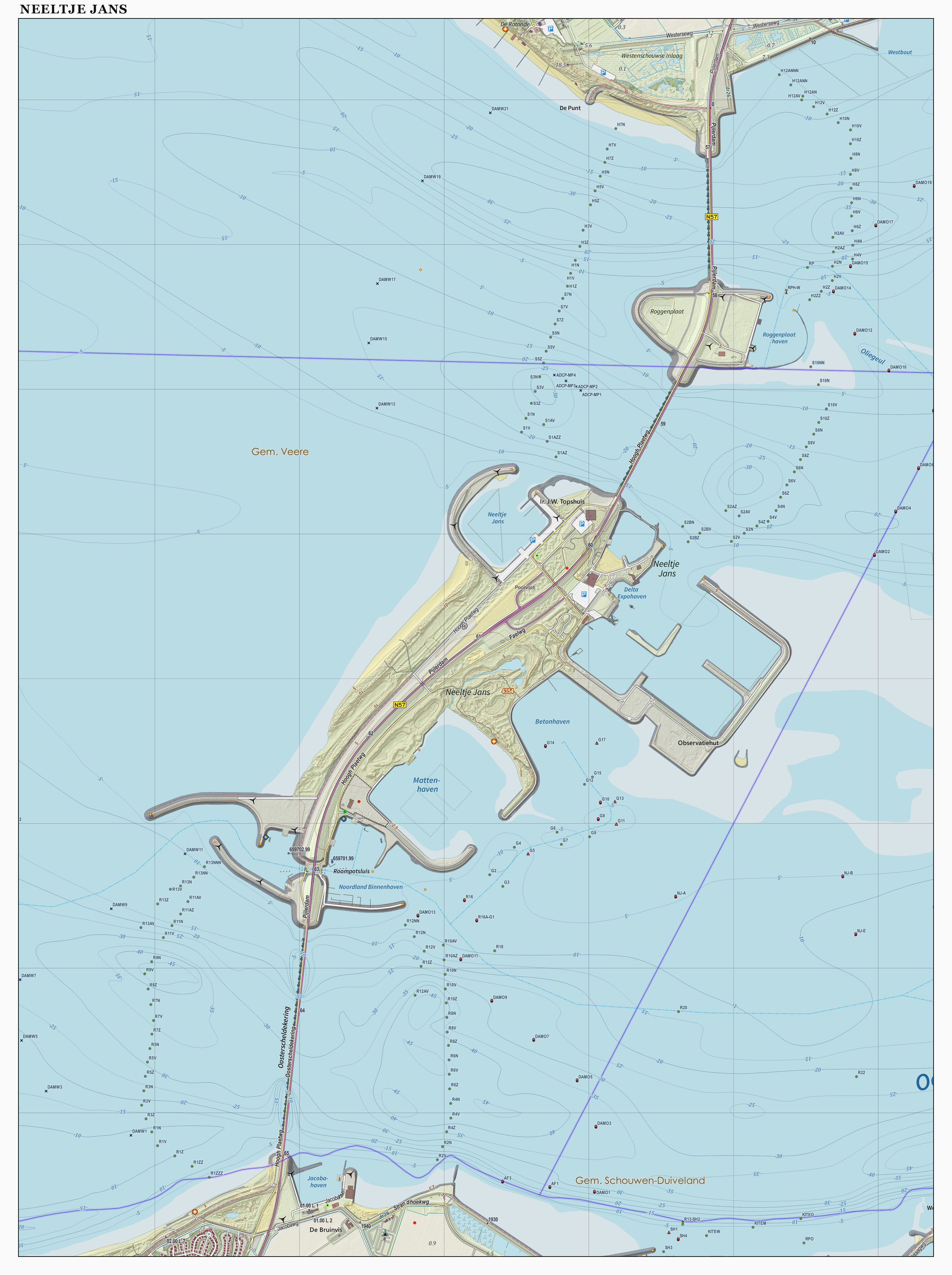 Topografische kaart van Neeltje Jans (natuurgebied). Resolutie: 400 pixels/km. Samengesteld door Jan-Willem van Aalst op basis van de GML open geodata van de BRT/Top10NL (basisregistratie Topografie, Kadaster), vrijgegeven door Kadaster onder de Creative Commons BY licentie. Additionele gegevens uit BAG uit de Open Street Map en uit de Risicokaart. Zie ook de Legenda.